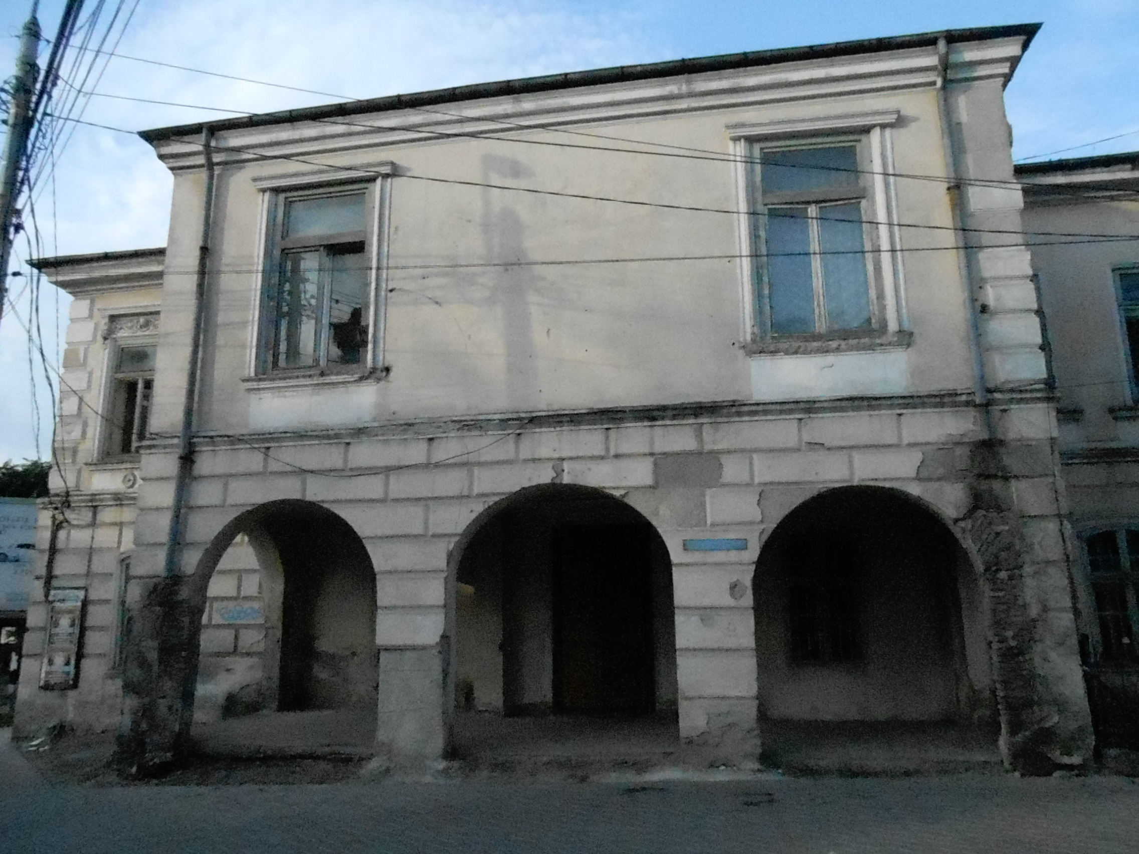 Fostul Conservator de Muzică Str. Muzicescu Gavril 18